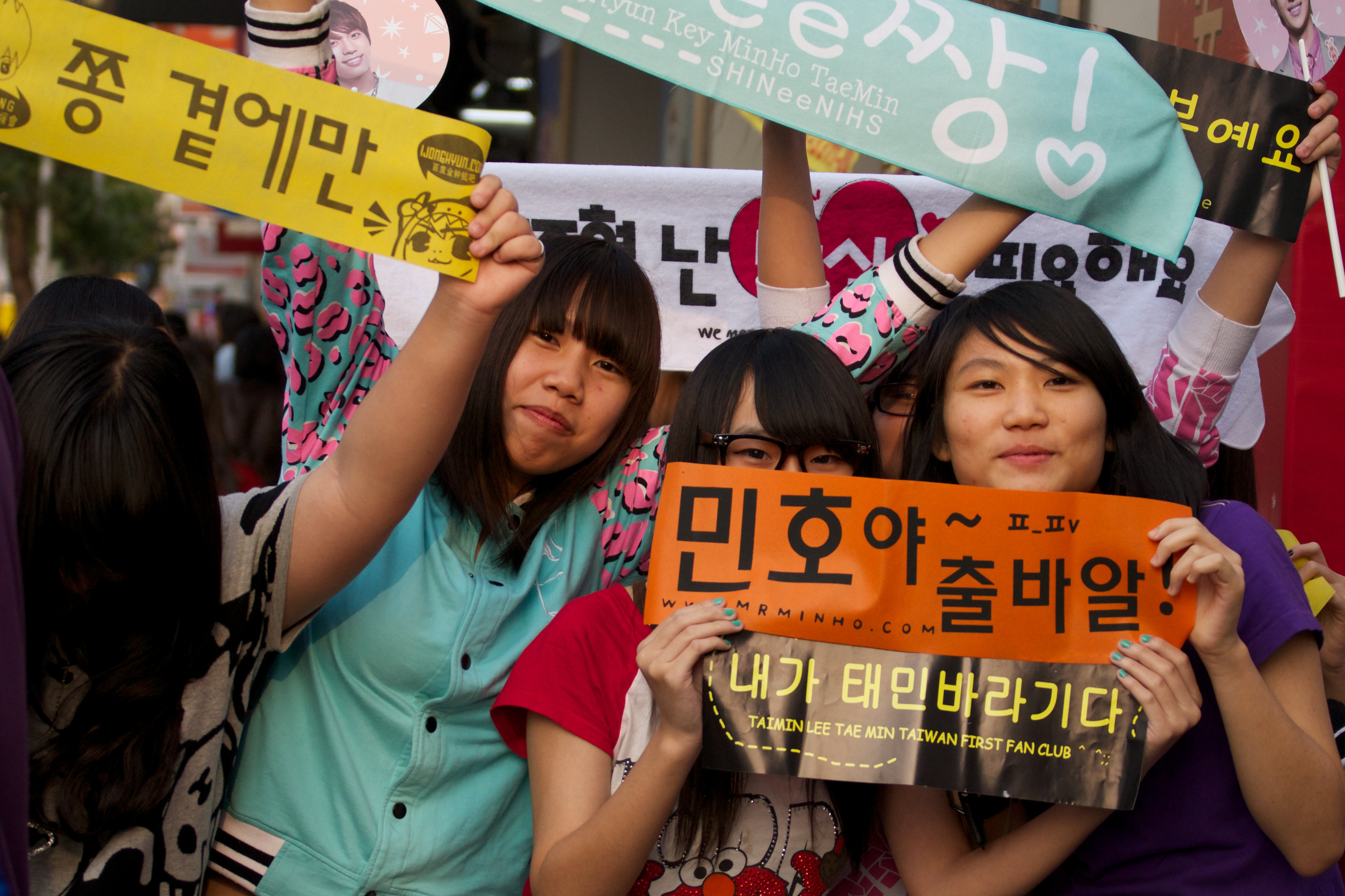 Kaohsiung, Taiwan